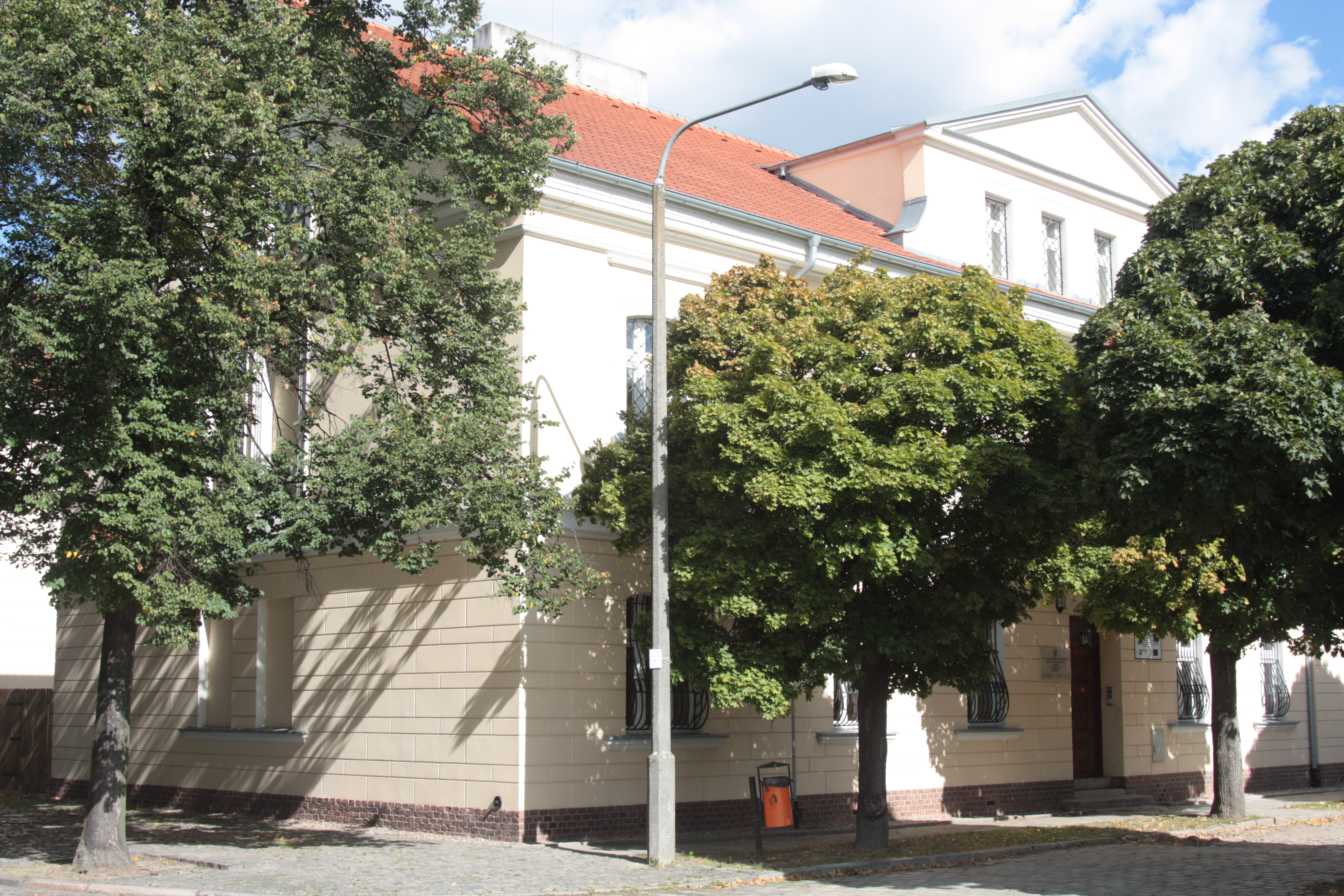 Poznań, ul. Posadzego 2 - dom mieszkalny, obecnie Archiwum Archidiecezjalne (zabytek nr A 057)